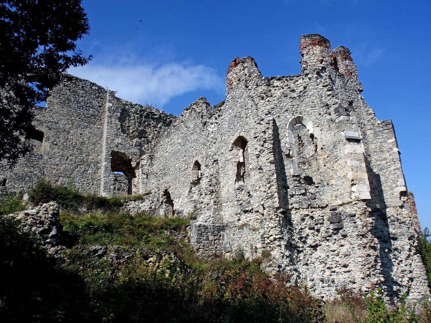 Ružica grad, najveći sačuvani dvorac u Slavoniji i jedan od najvećih u Hrvatskoj